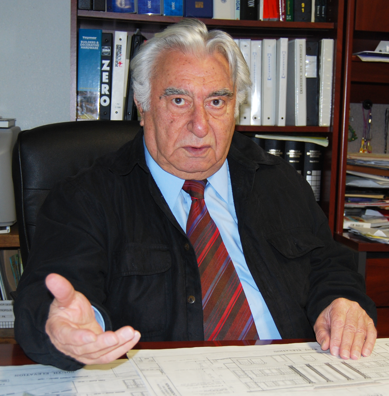 Леон Адамов за работой